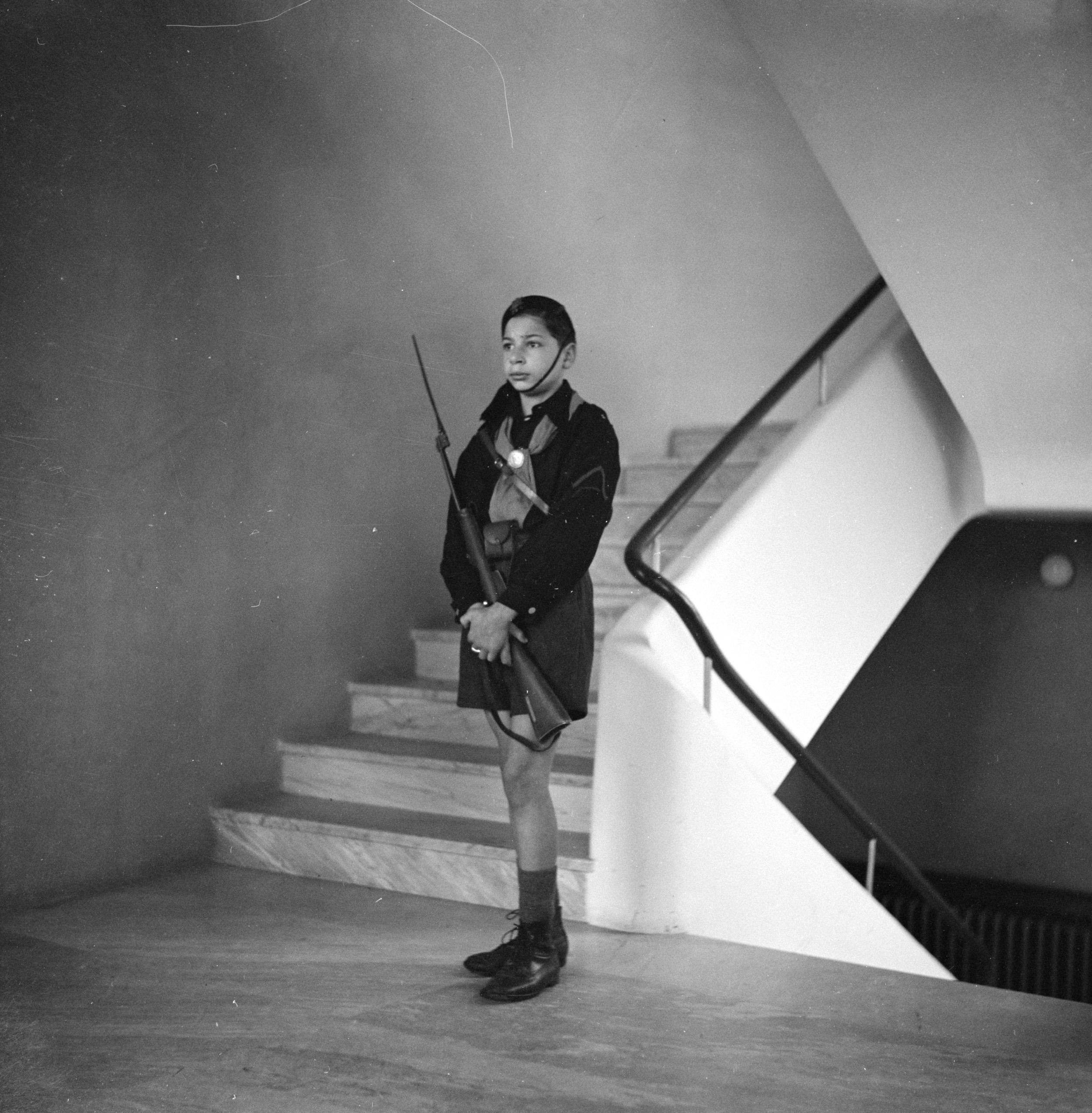 Collectie / Archief : Fotocollectie Van de Poll Reportage / Serie : Rome: Bezoek aan het nieuwe tehuis van Ballila Beschrijving : Jongen staat op wacht bij een trap Annotatie : Opera Nazionale Balilla was een fascistische jongerenbeweging van 1926 tot 1937 Datum : december 1937 Locatie : Italië, Rome Trefwoorden : architectuur, gebouwen, interieur, jongens, wapens Fotograaf : Poll, Willem van de Auteursrechthebbende : Nationaal Archief Materiaalsoort : Negatief (zwart/wit) Nummer archiefinventaris : bekijk toegang 2.24.14.02 Bestanddeelnummer : 252-0027